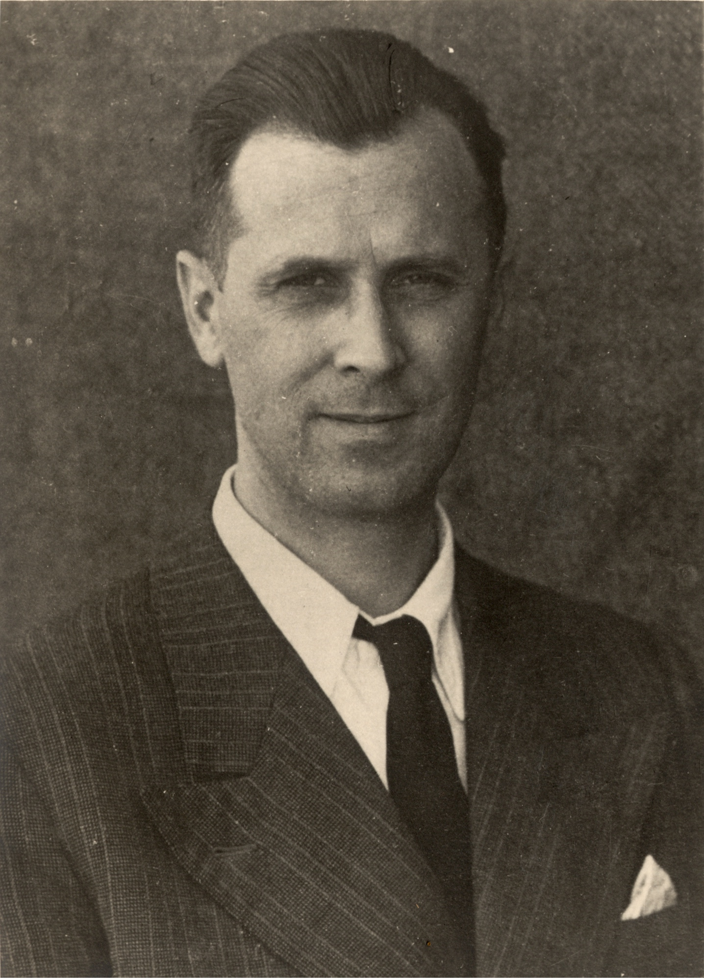 Attilio Colacevich, direttore dell'Osservatorio Astronomico di Capodimonte dal 1948 al 1953